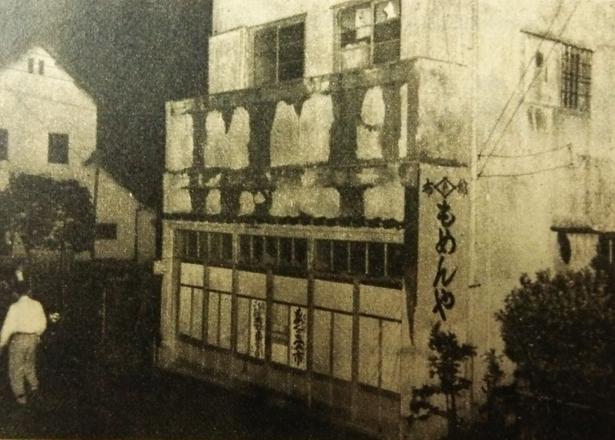 カービン銃ギャング事件犯人の潜伏先